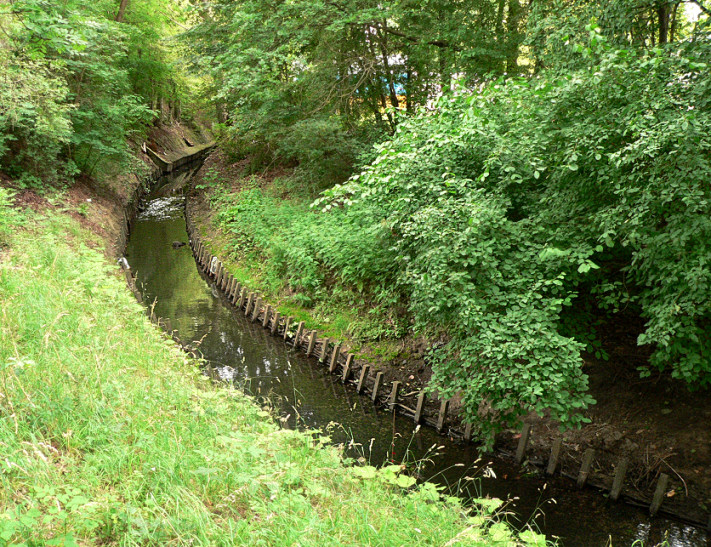 Fösse in Hannover